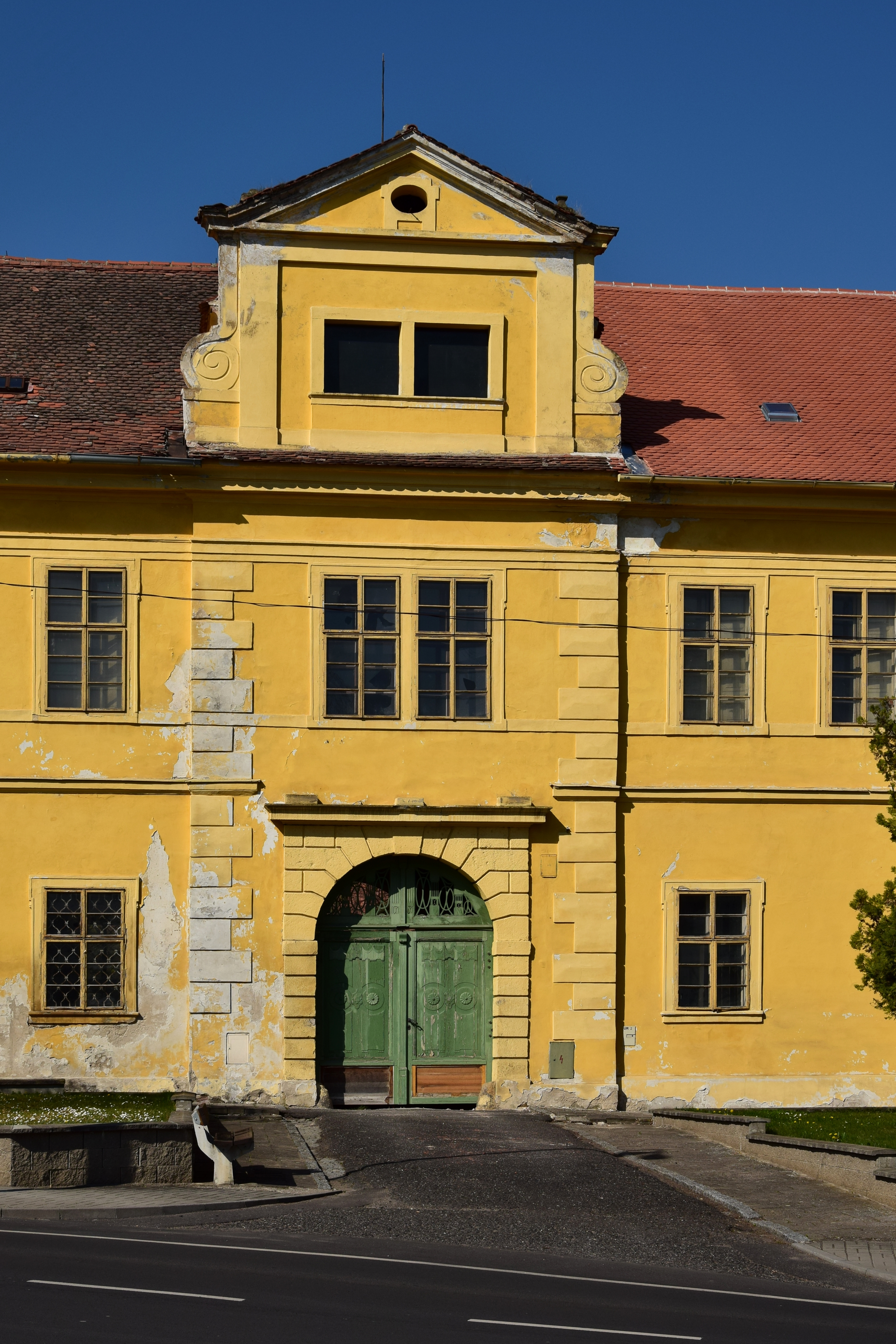 Zámek Cítoliby – vstupní rizalit